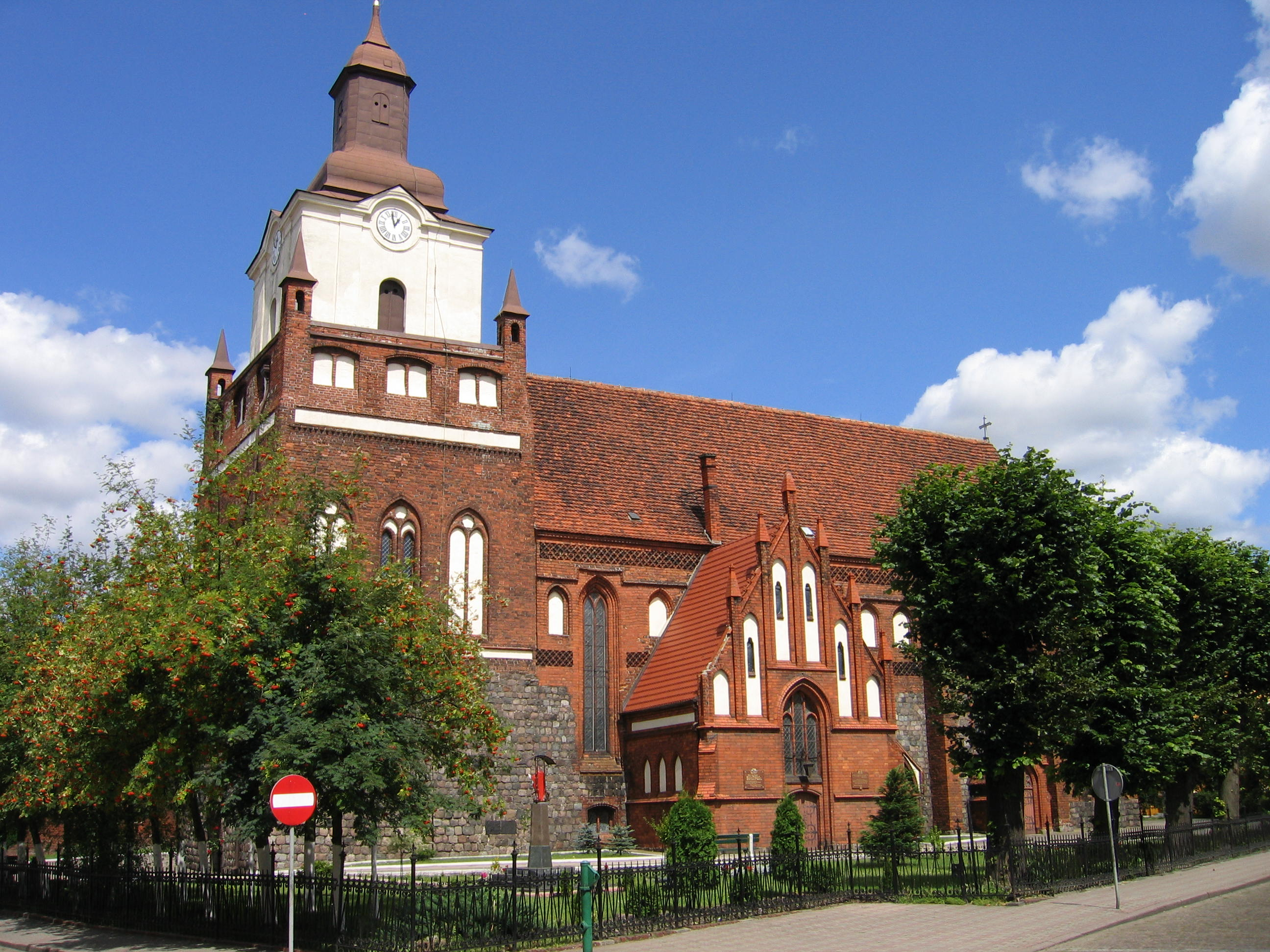 Mieszkowice - kościół Przemienienia Pańskiego